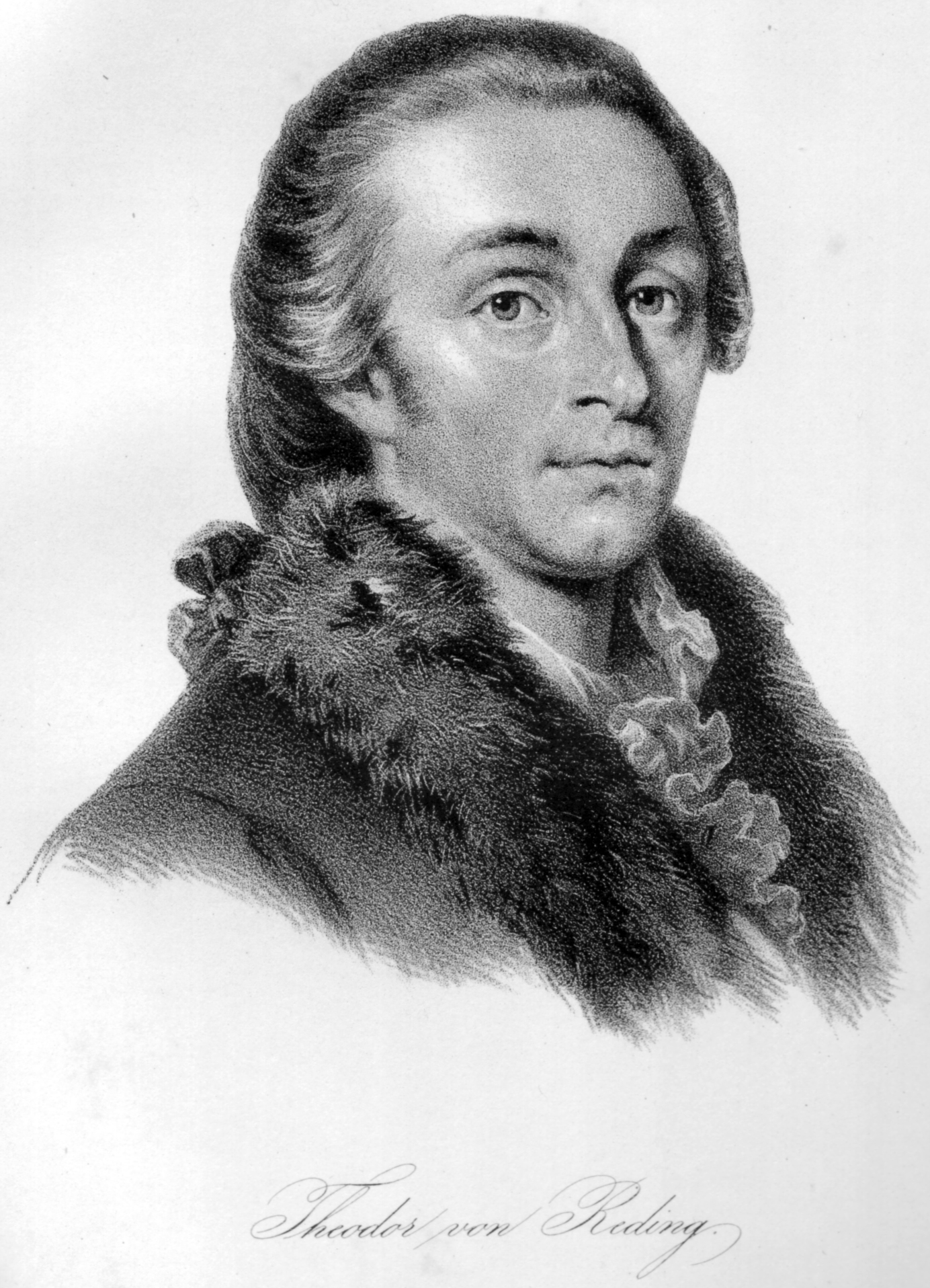 Porträt von Theodor von Reding